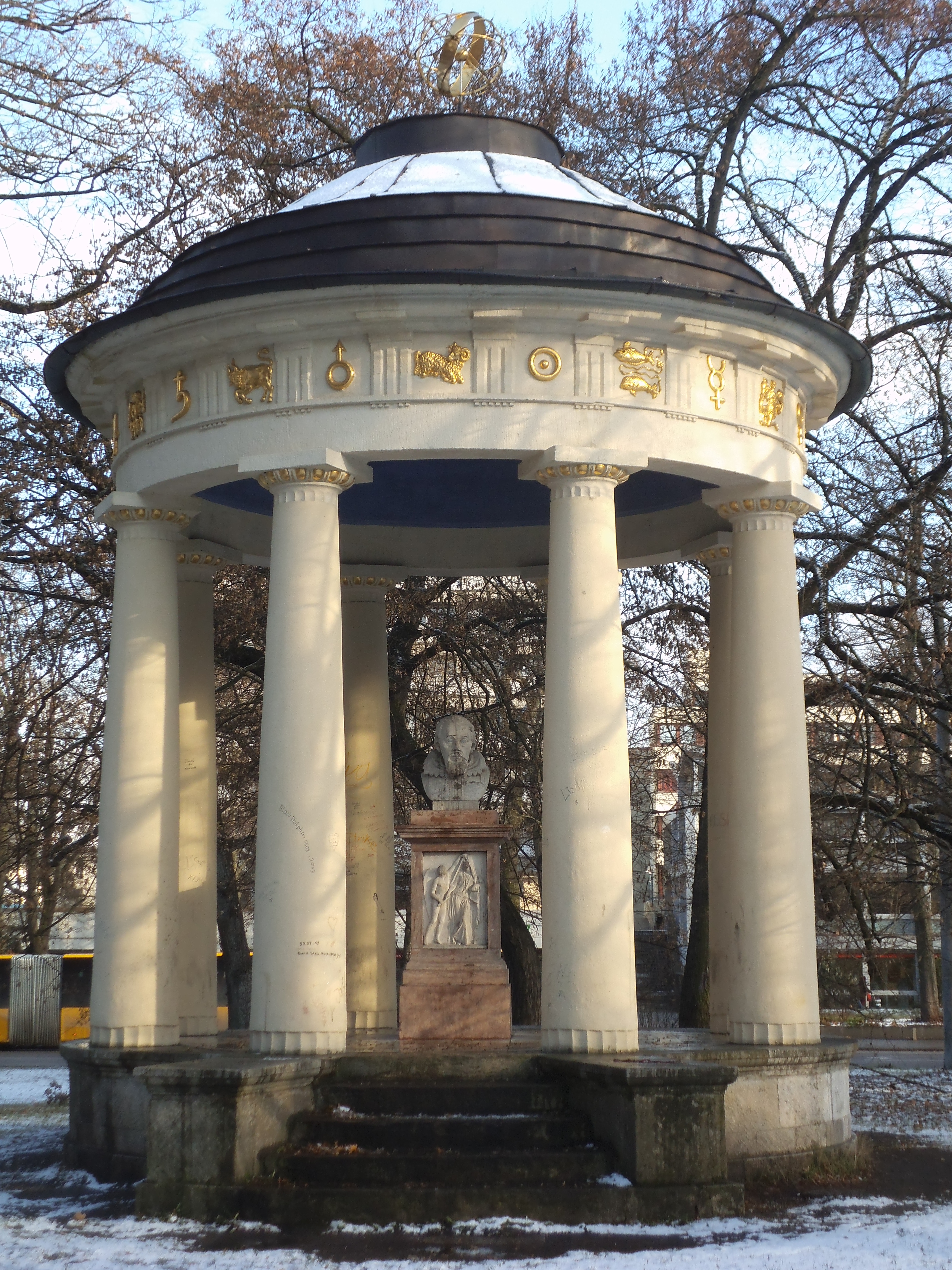 Kamenný altánek s bustou Jana Keplera v Řezně poblíž vlakového nádraží